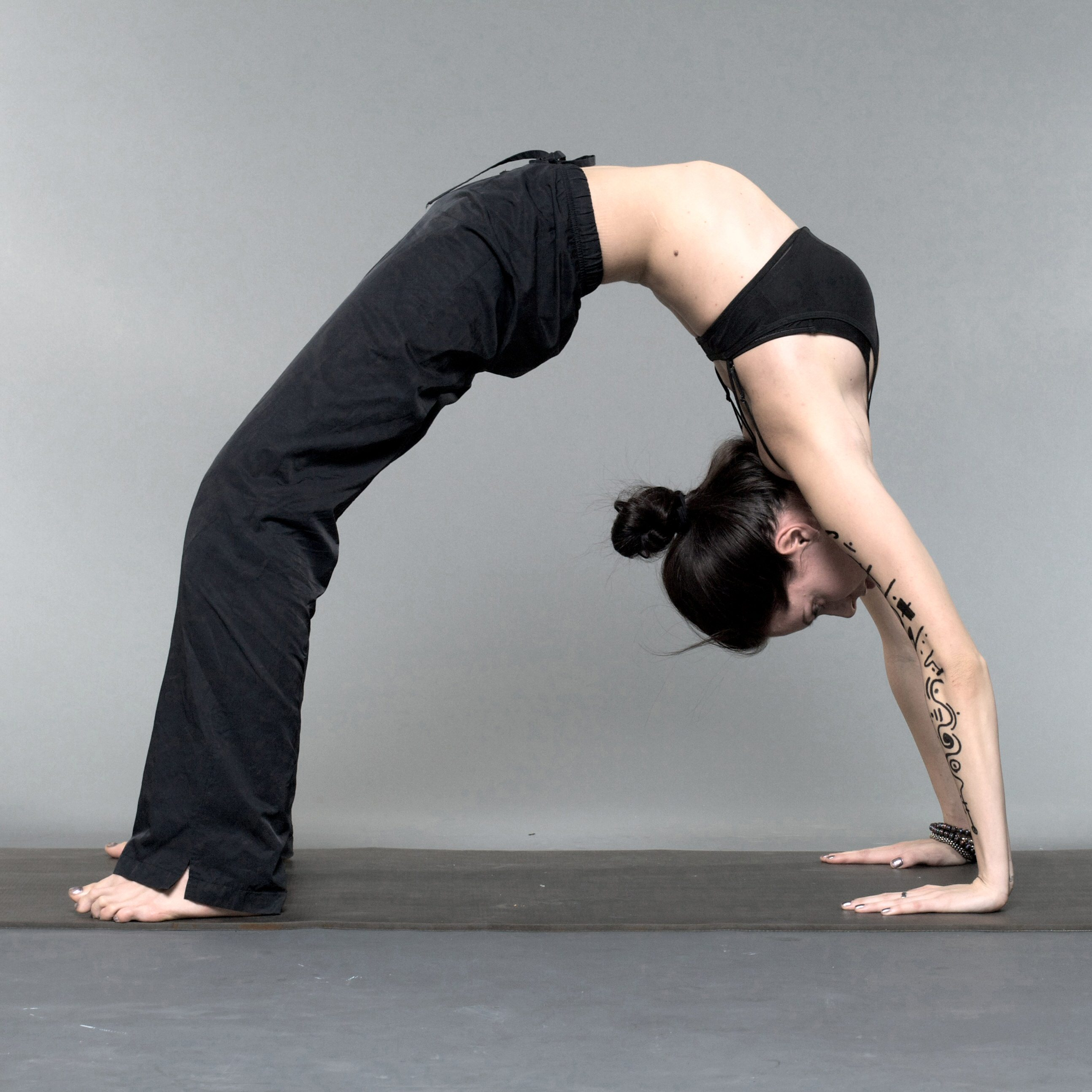 Chakrasana by Nina Mel, Yoga Teacher